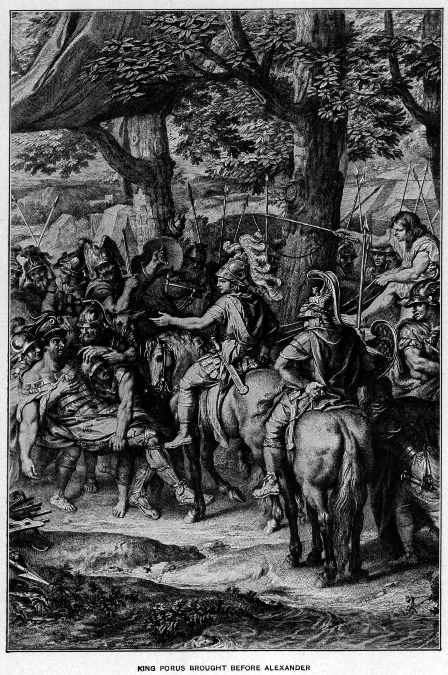 Alexander old drawings